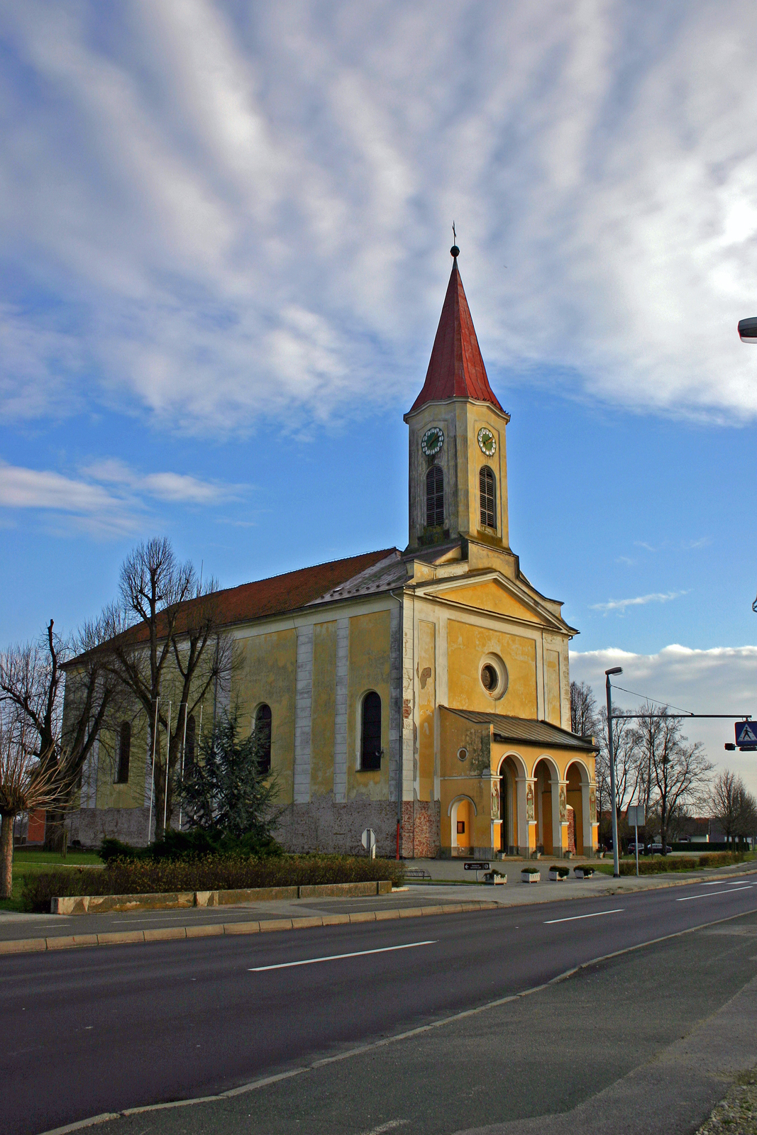 Cerkev svetega Križa, Črenšovci. Saint cross church, Črenšovci. Heilige Kreuz Kirche, Črenšovci.